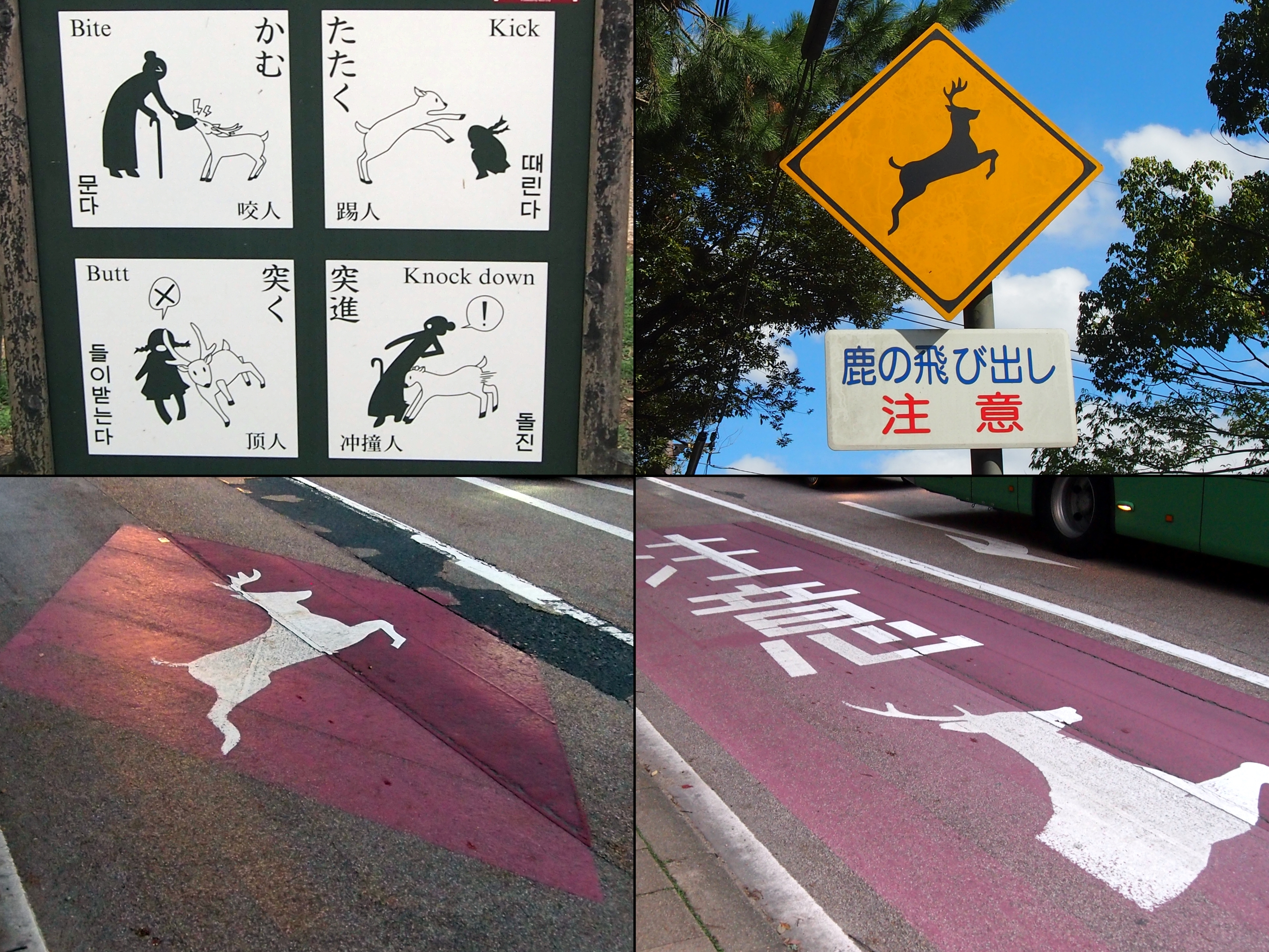 鹿からの攻撃に関する注意、飛び出し注意。